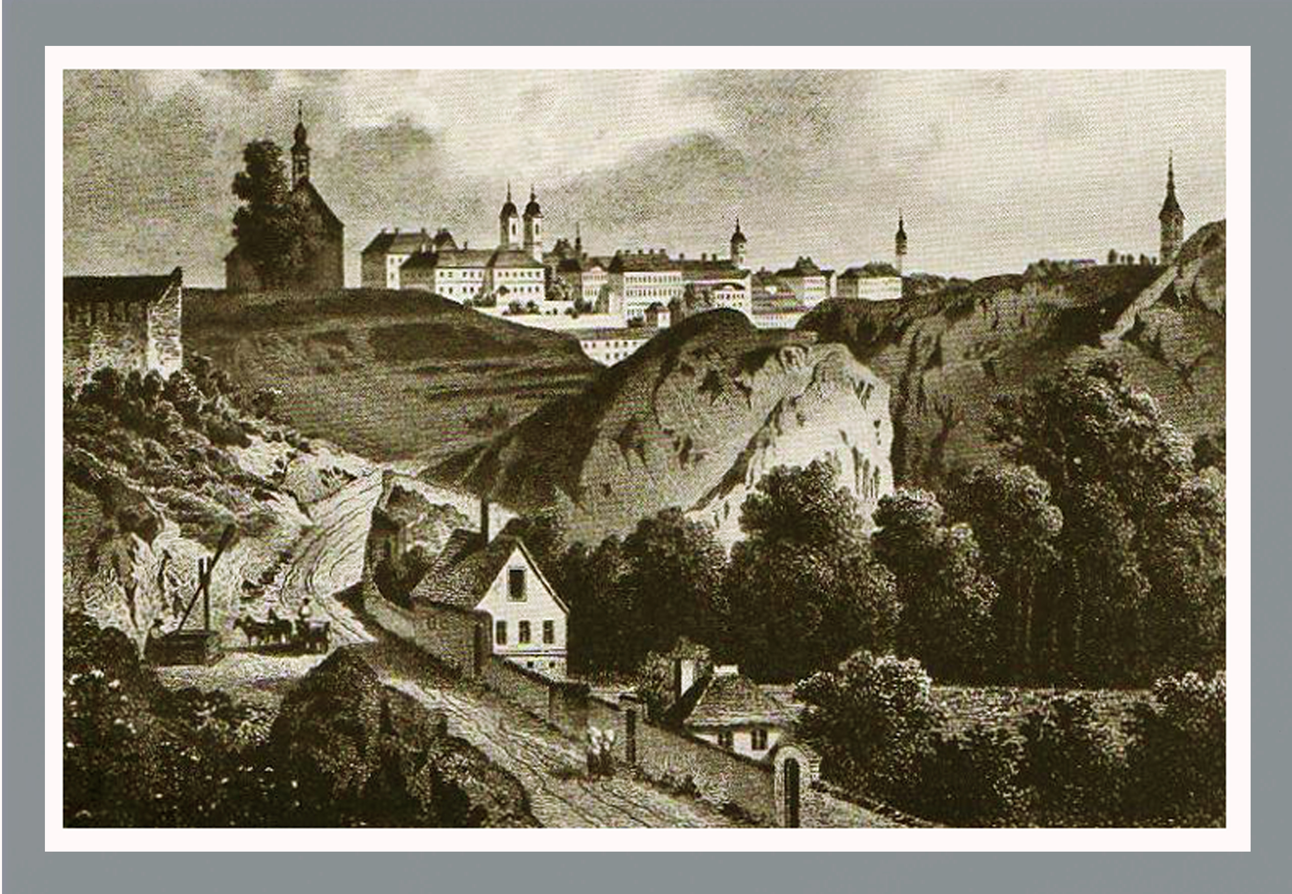 A Séd-kapu a Vögyhíd építése előtt (Veszprém)